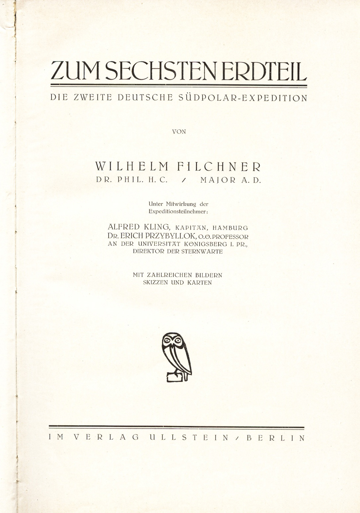 Portada. Wilhelm Filchner. "Zum Sechsten Erdteil". Berlin 1922